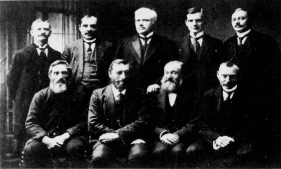 Føroyskt: Tingmanning Sambandsfloksins í 1918. Sitandi vinstrumegin frá: Mikkjal Samuelsen, Vík, Mikal Matras, Viðareiði, Jógvan Poulsen, Strondum og Joen Jákup Weihe, Norðskála. Standandi vinstrumegin frá: Jógvan Rasmussen, Sørvági, Andrass Samuelsen, Fuglafirði, Oliver Effersøe, Tvøroyri og Poul Niclasen og H.C.W. Tórgarð, Tórshavn.